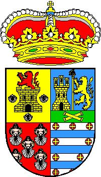 Escudo del concejo de Salas